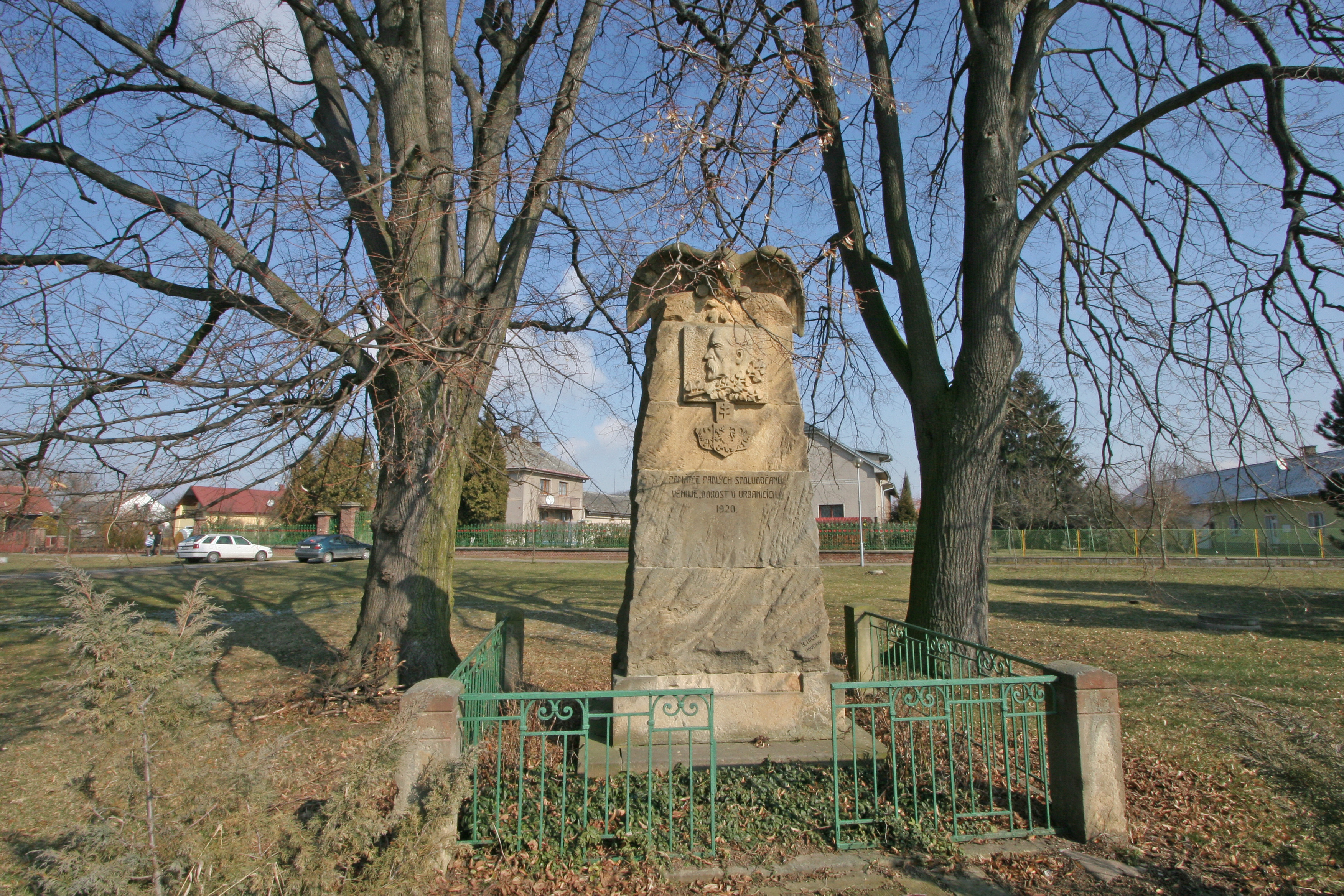 Urbanice památník padlých